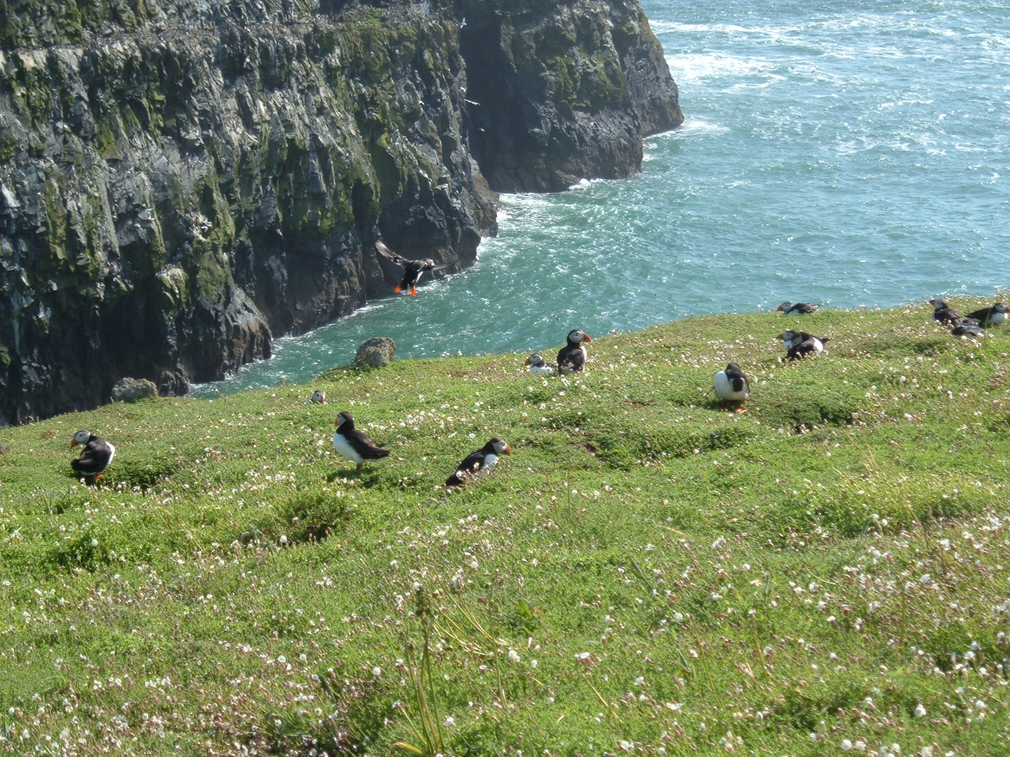 Fratercula arctica